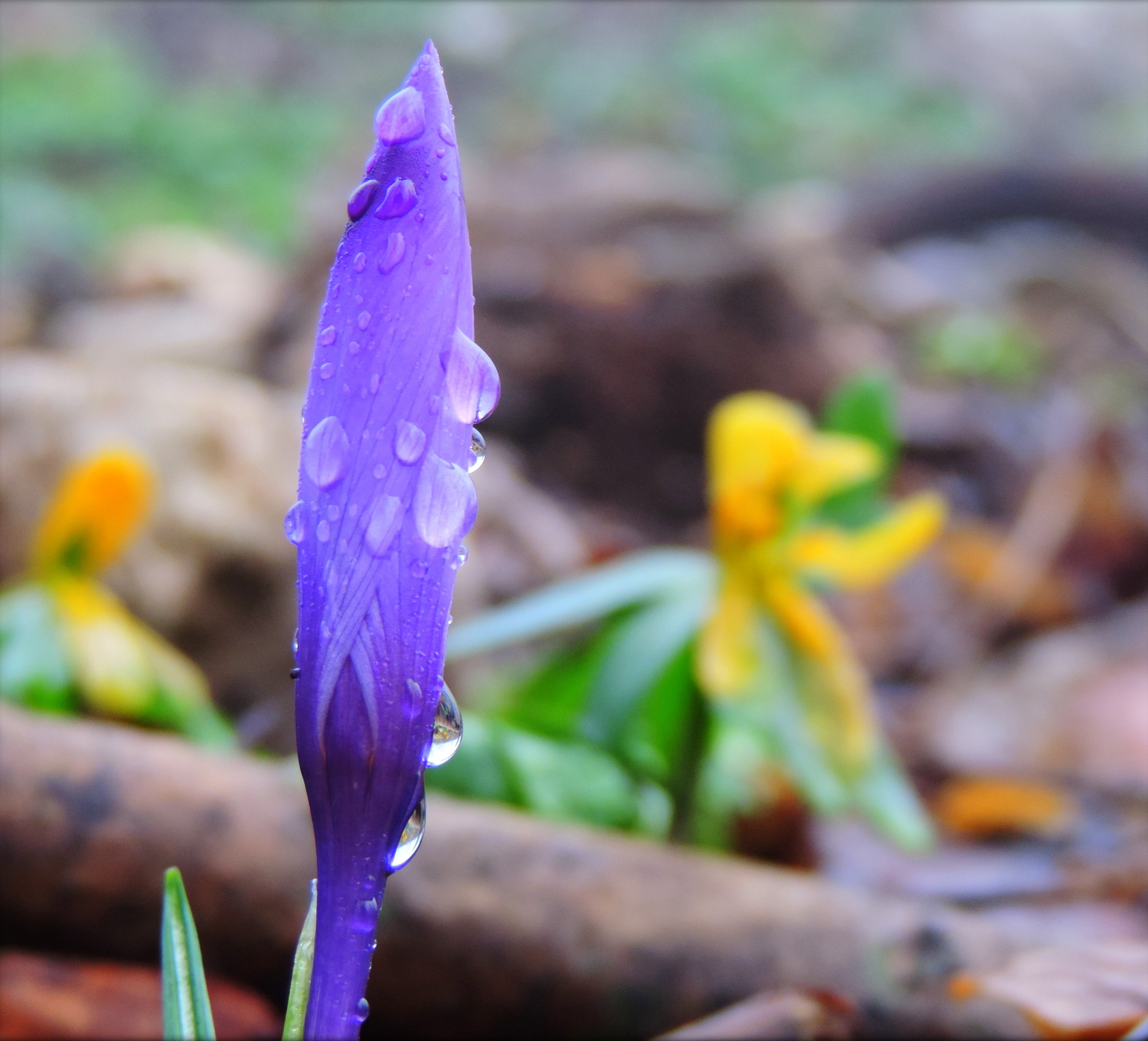 buđenje iz zimskog sna